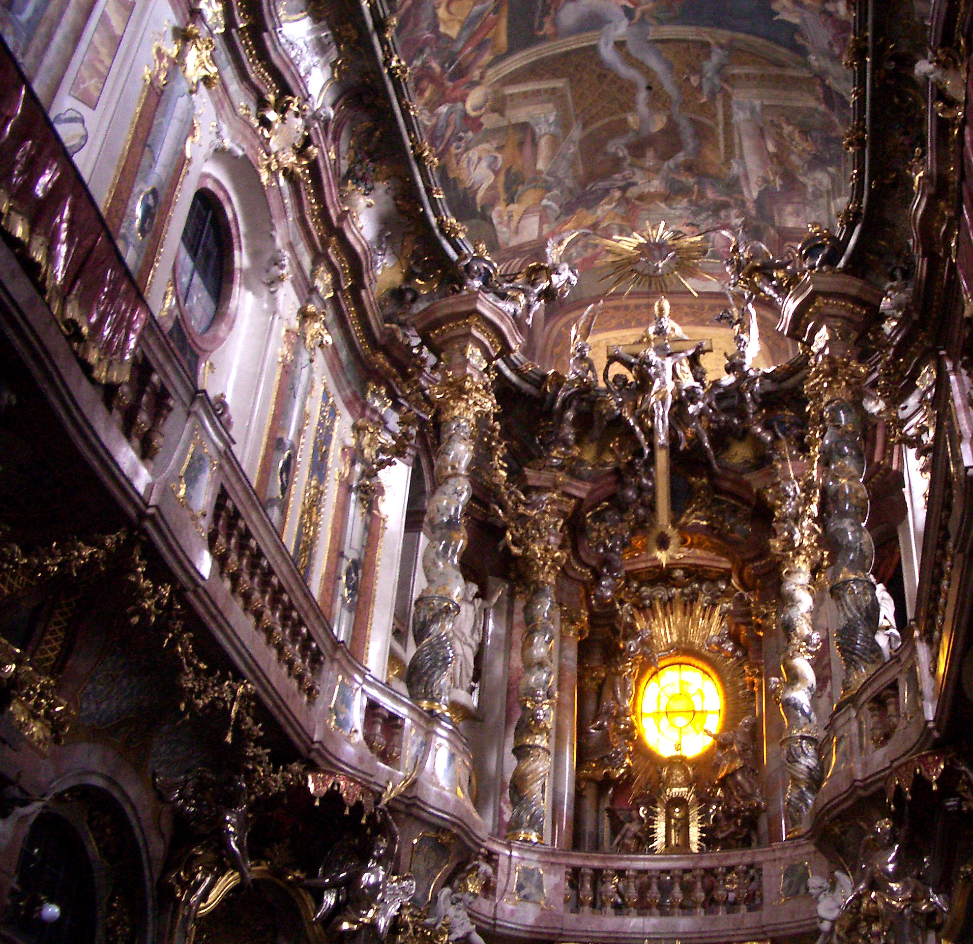 München, Germany: Asamkirche